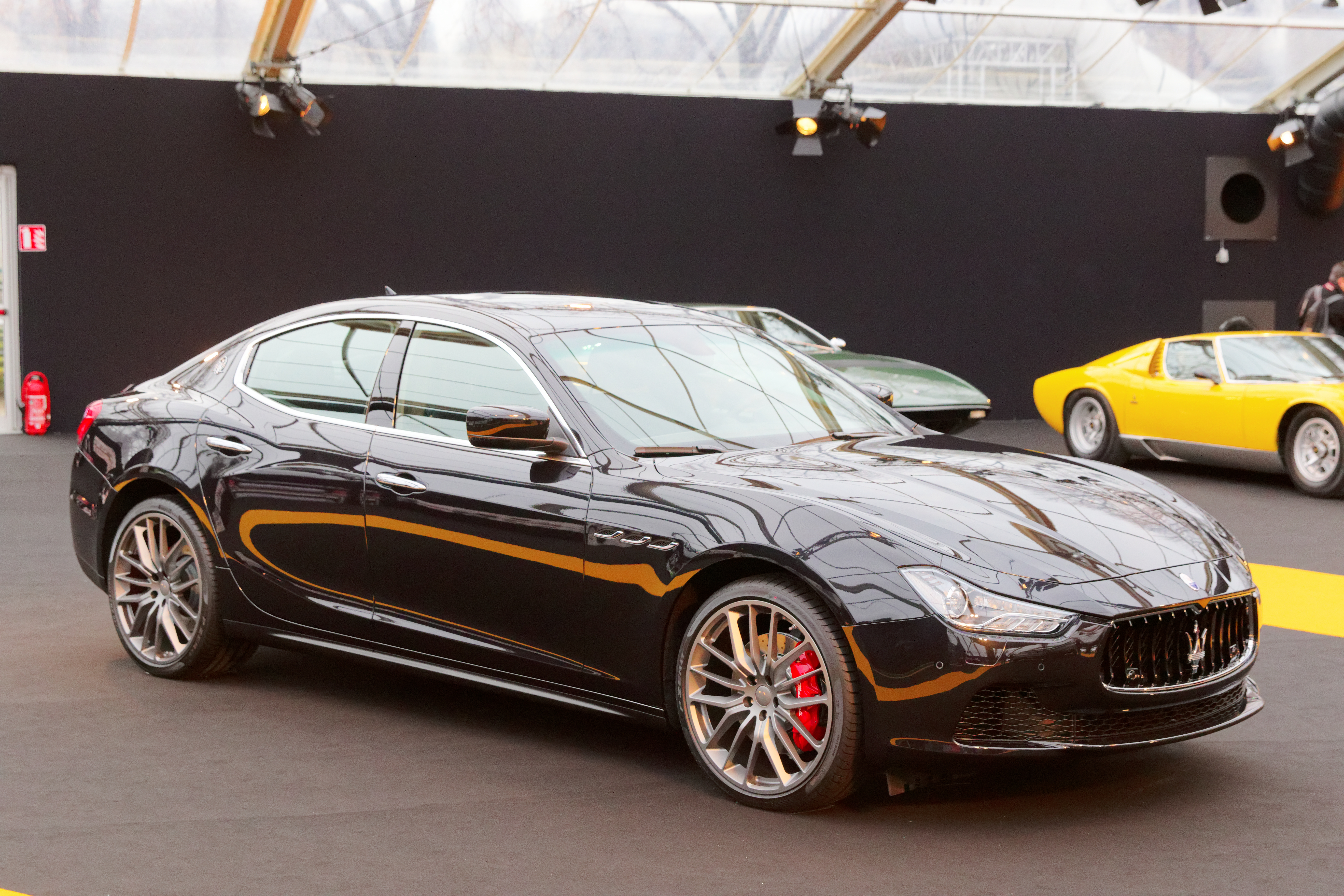 La Maserati Ghibli Ermenegildo Zegna Edition exposée lors du festival automobile international 2016.